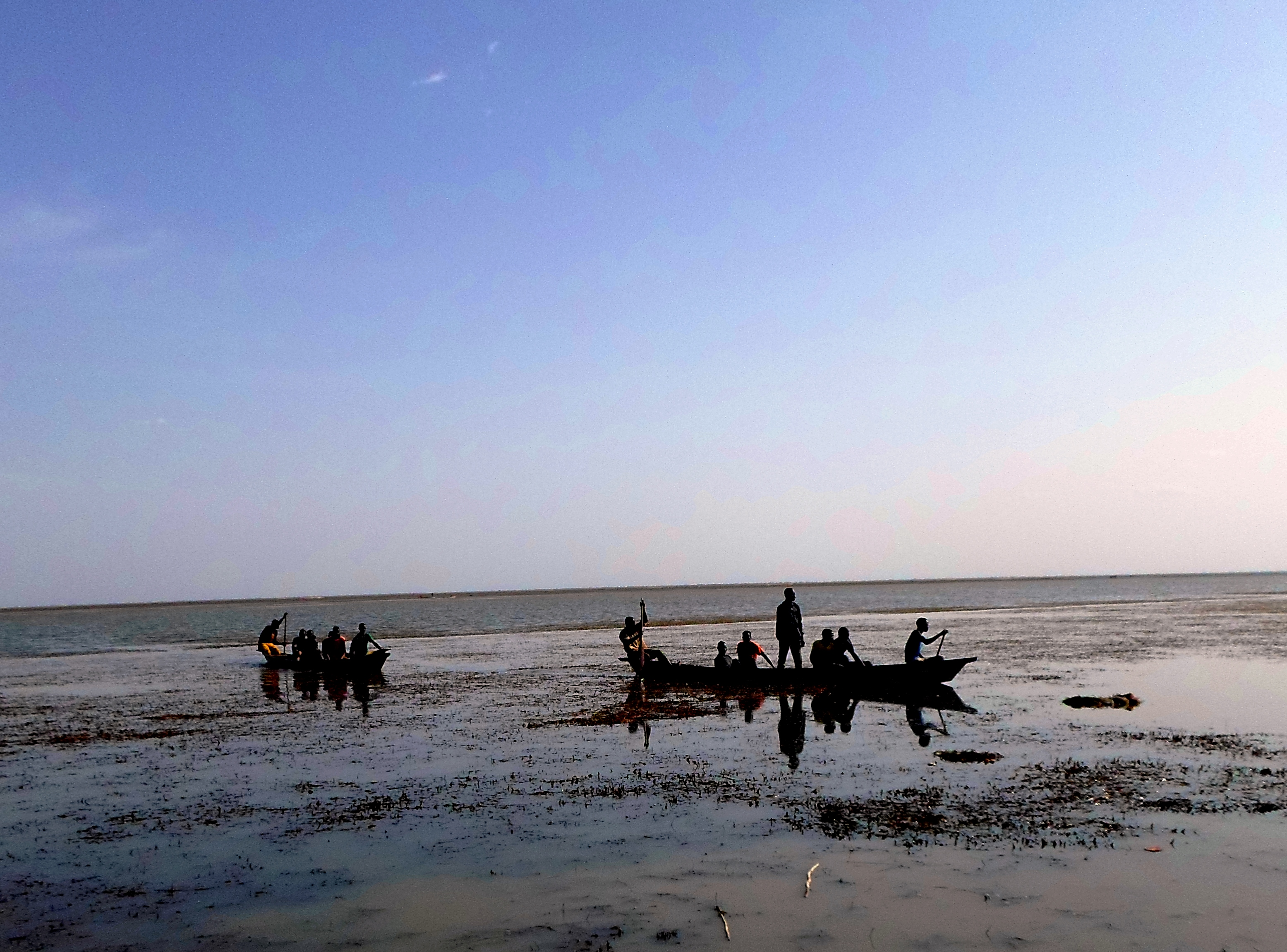 Vues du lac de Maga Localisation : Mayo-Danay, Extrême-Nord